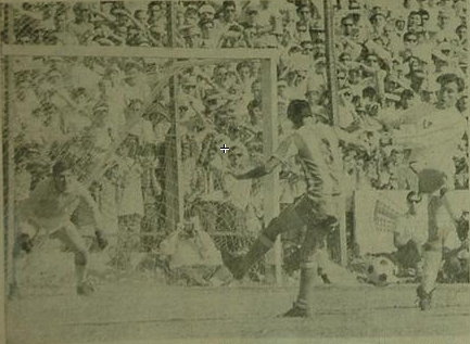 Gol del Fastasma Ruíz futbolista del Club Atlético Unión para la victoría frente a Talleres